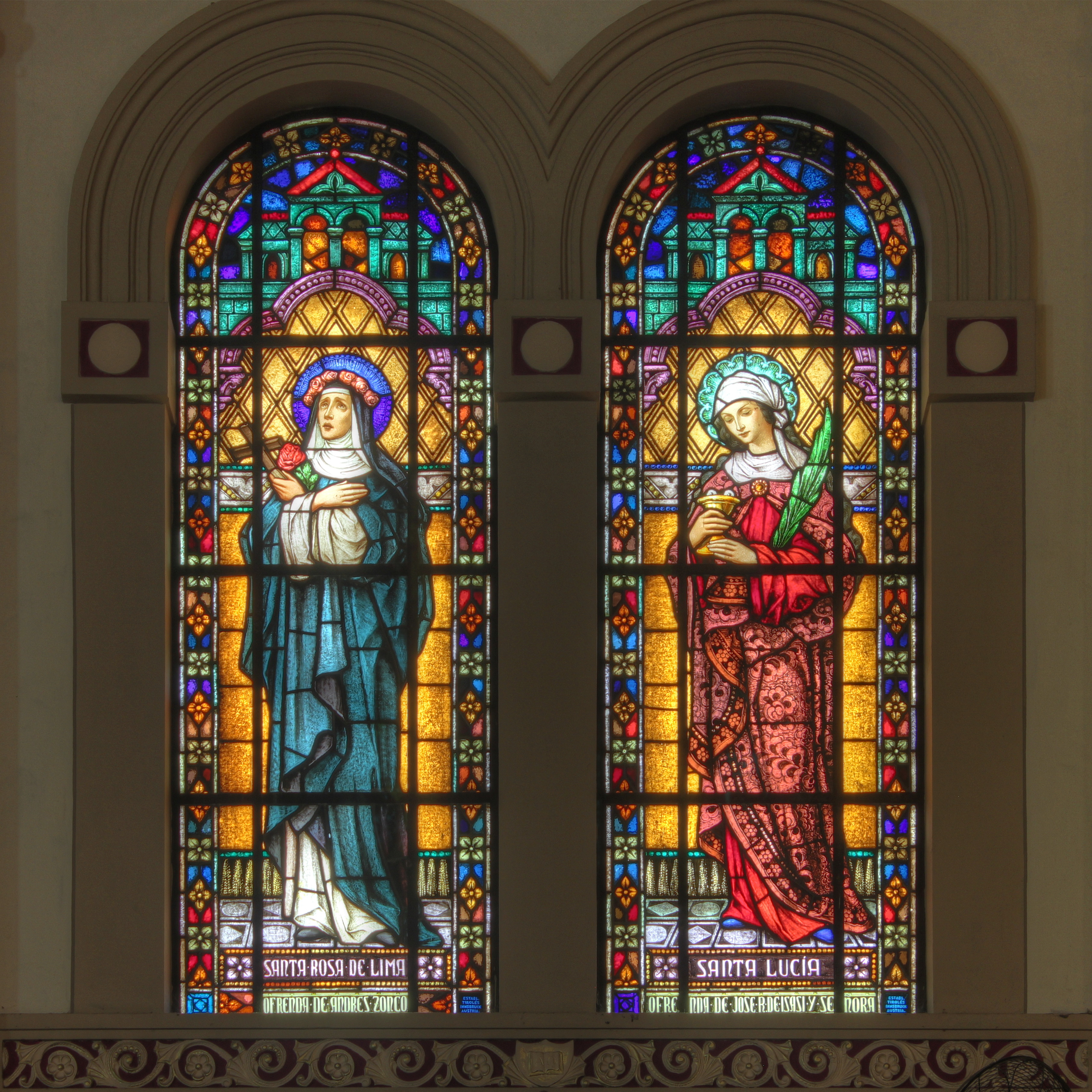 Parroquia Inmaculado Corazón de María. Imagen de Santa Rosa de Lima y Santa Lucía